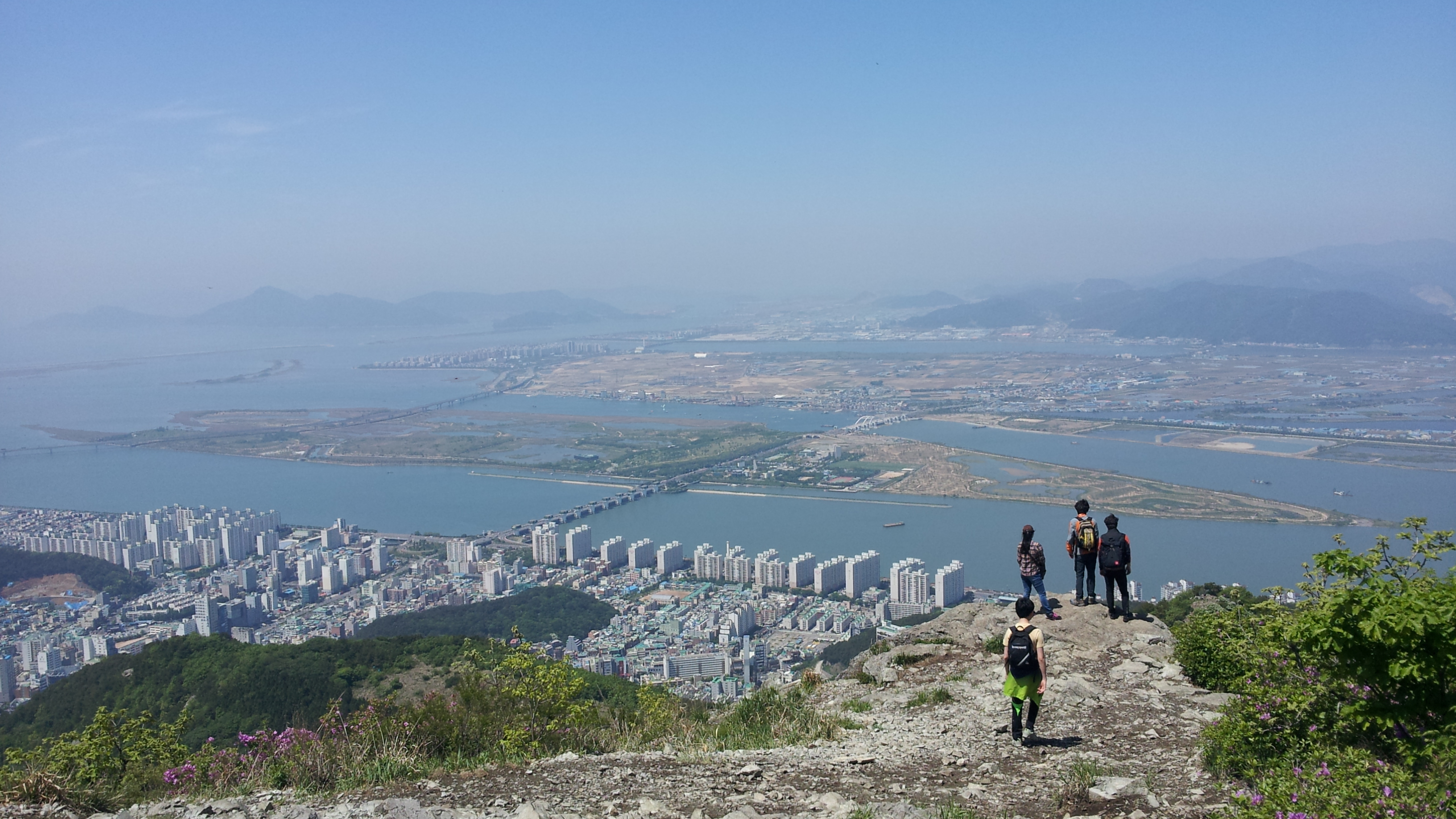 승학산에서 바라 본 사하구 을숙도